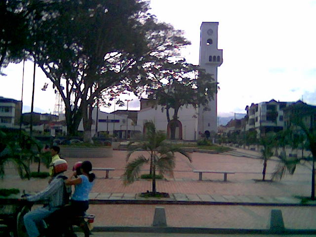 Parque Principal de Pitalito